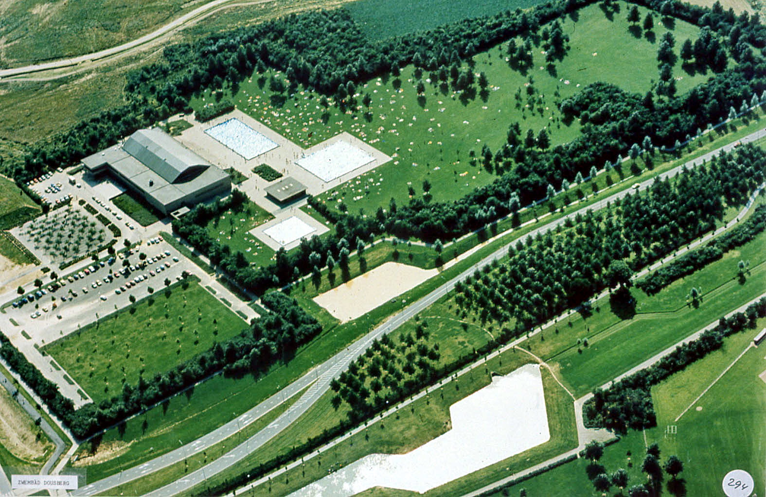 Luchtopname van zwembad Dousberg in Maastricht, ca. 1975. Fotocollectie RHCL Maastricht, GAM 19836.